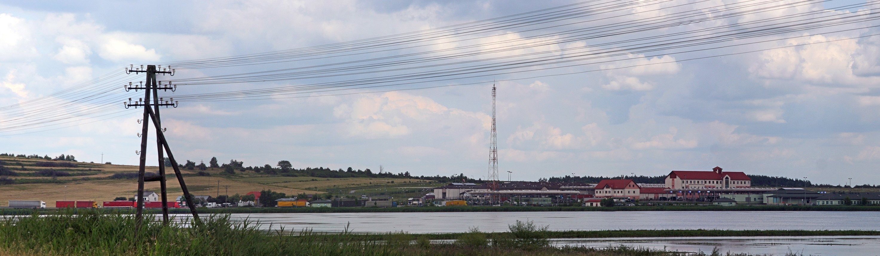 Graniczne przejście drogowe w Hrebennem, wysoki budynek po prawej to placówka Straży Granicznej